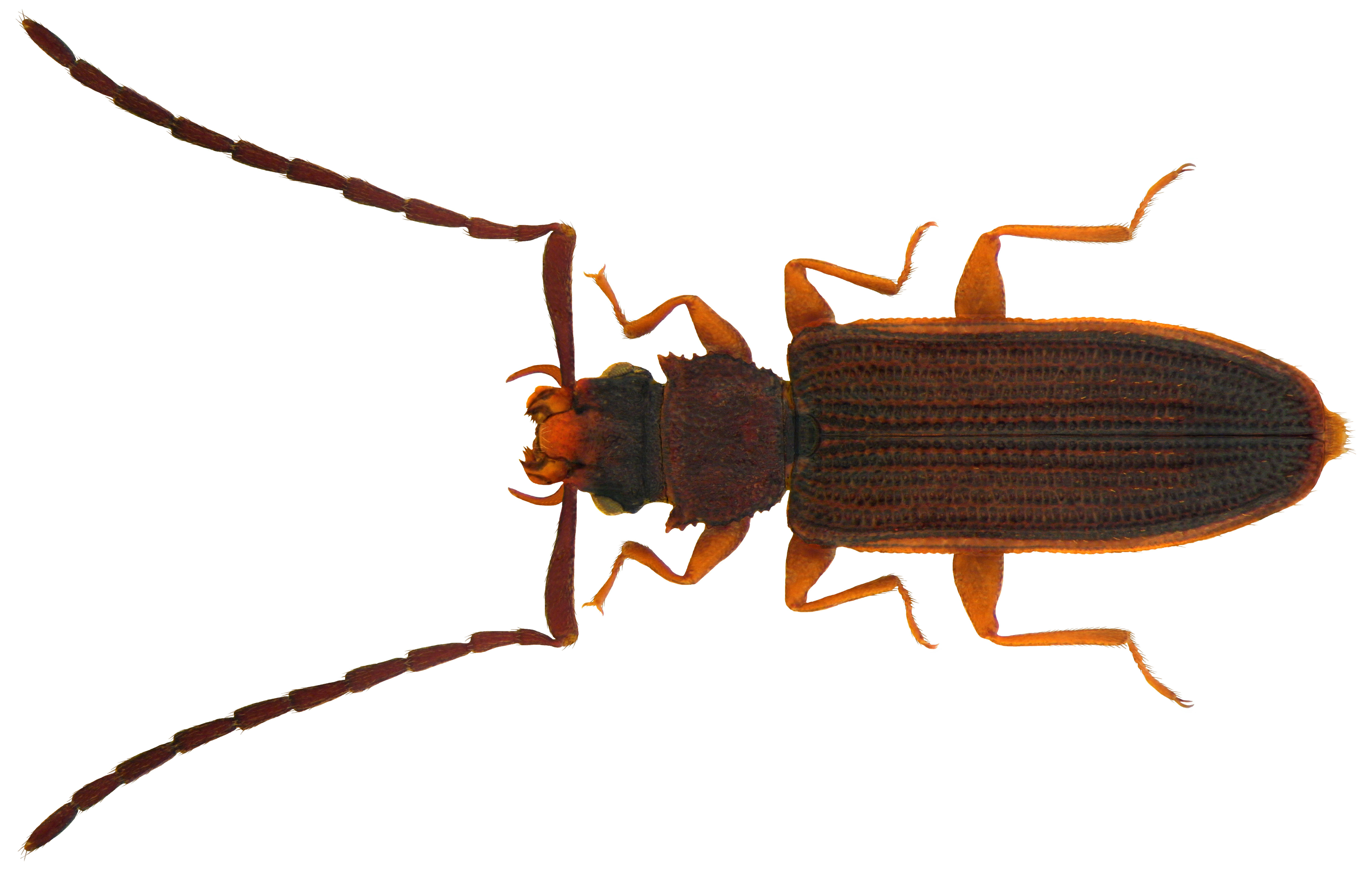 Familie: Cucujidae Groesse: 4,5-5,5 mm Verbreitung: Europa Oekologie: unter abgestorbener Rinde von Laub- und seltener von Nadelholz; lebt wahrscheinlich carnivor Fundort: Germania, Elsass, Huningue leg.det. R.Greger, 1968 Photo: U.Schmidt, 2010